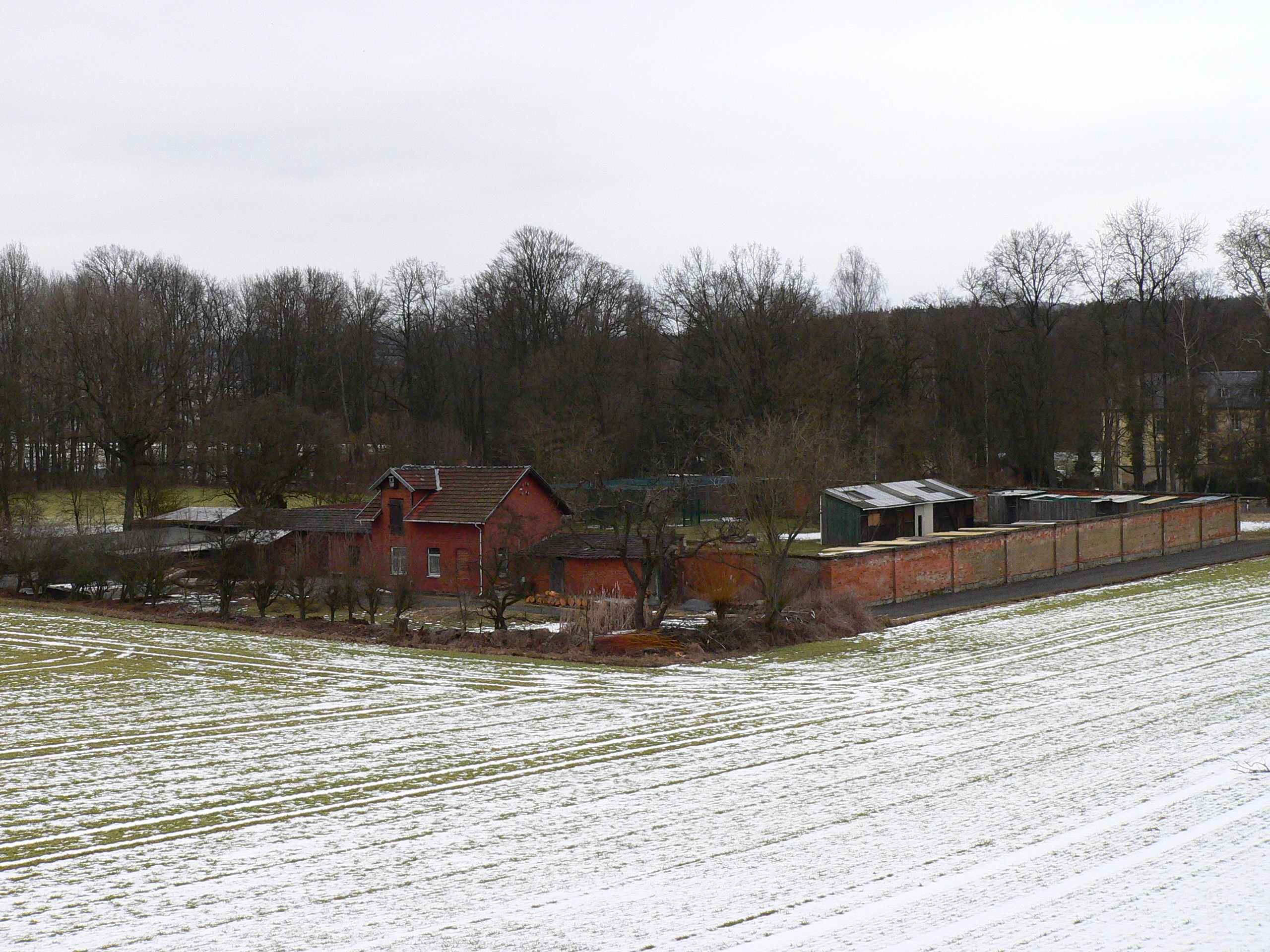 Denkmalgeschütztes Objekt in Coburg (Bayern), ehemalige Domängertnerei in Neu- und Neershof